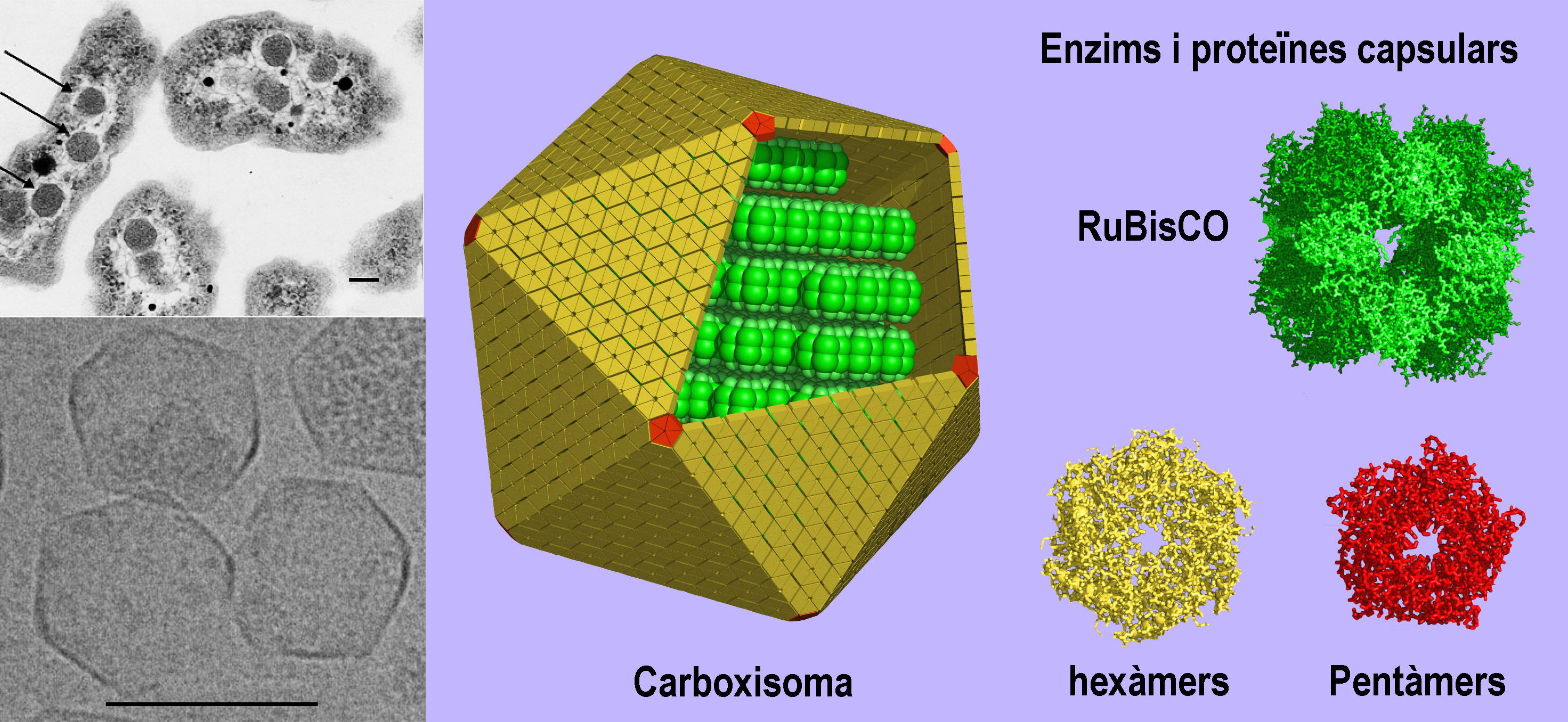 (A dalt a l'esquerra) Micrografia de secció prima de cèl·lules de H. neapolitanus amb els carboxisomes a l'interior. En una de les cèl·lules presentades, les fletxes indiquen els carboxisomes visibles. (A baix a l'esquerra) Carboxisomes purificats (material cortesia de S. Heinhorst i G. Cannon) vistos per criomicroscòpia electrònica (cortesia de M. Yeager i K. Dryden). (Dreta) Models de l'estructura del carboxisoma. Les dades actuals suggereixen que la carcassa es compon d'uns quants centenars de blocs proteics hexamèrics i 12 de pentamèrics. L'estructura tridimensional de les proteïnes capsulars ha estat determinada per difracció de rajos X. RuBisCO, l'enzim interior principal, és mostrat empaquetat a l'interior en la configuració normal per senzillesa, tot i que encara no està compresa l'organització real dels enzims. L'altre enzim clau, l'anhidrasa carbònica, present en quantitats menors, no és presentat. Les barres d'escala representen 100 nm. (imatge de T. Yeates).